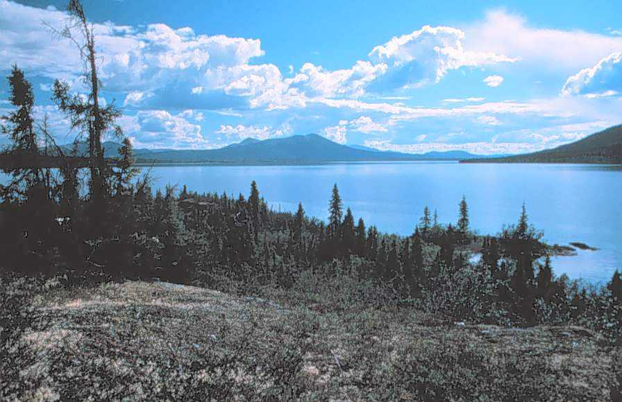 Walker Lake, Alaska